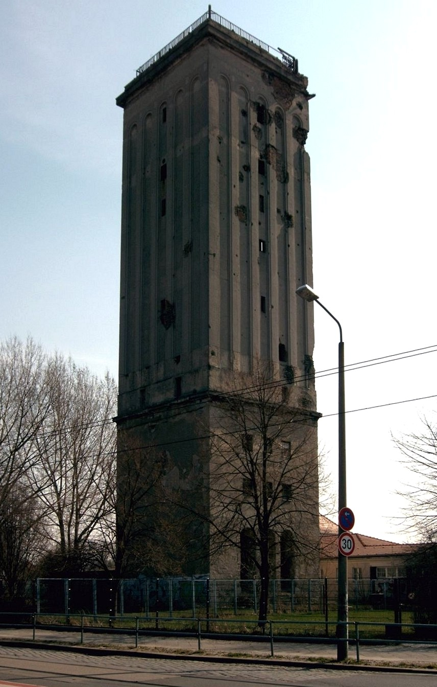 Wasserturm in Berlin-Heinersdorf, wo bis 1991 sowjetische Soldaten stationiert waren.